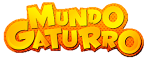 Logo Mundo Gaturro.